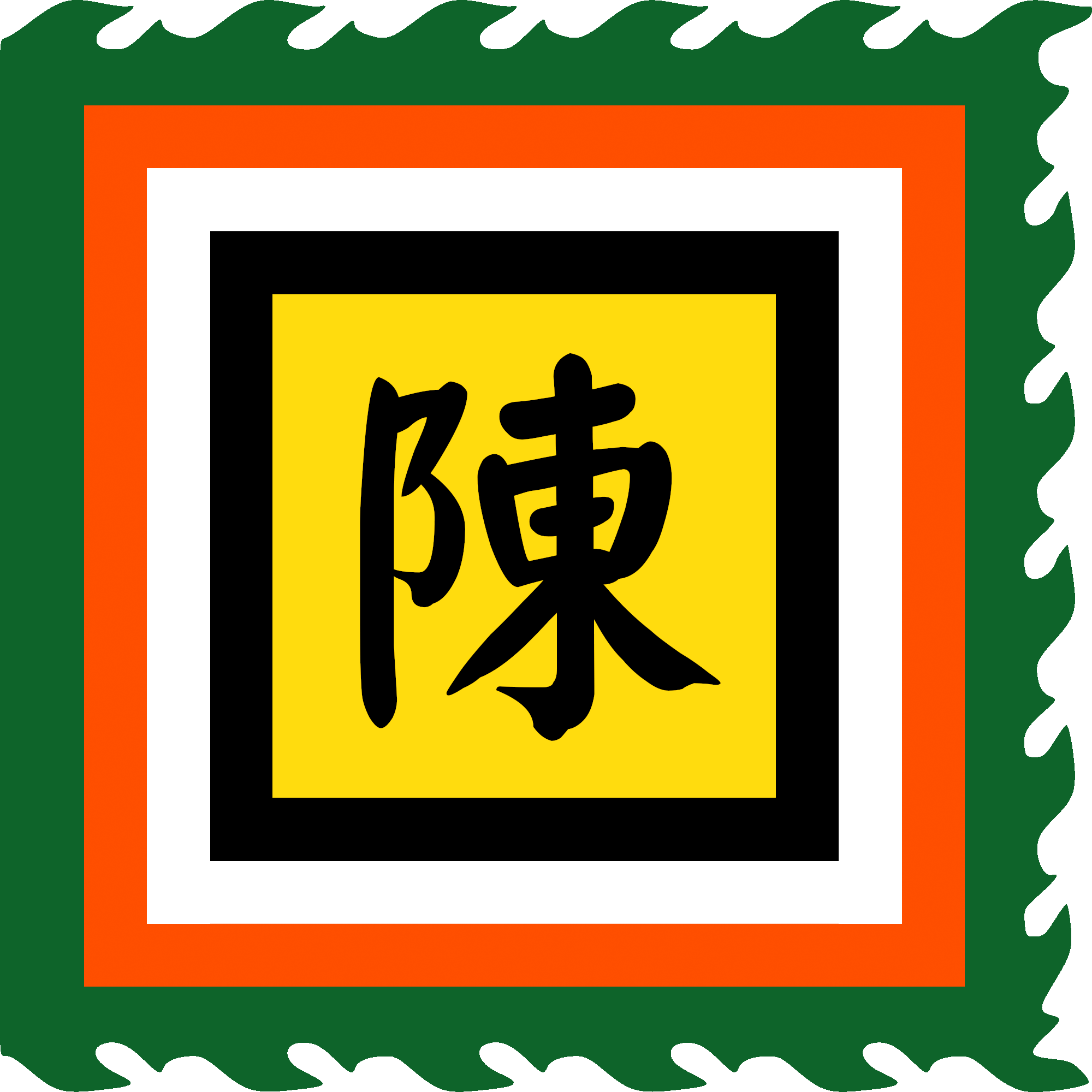 Flag of Saint Tran (Hiệu kỳ Đức Thánh Trần / Thánh kỳ Hải quân Việt Nam Cộng hòa), used since 1956 to 1975.